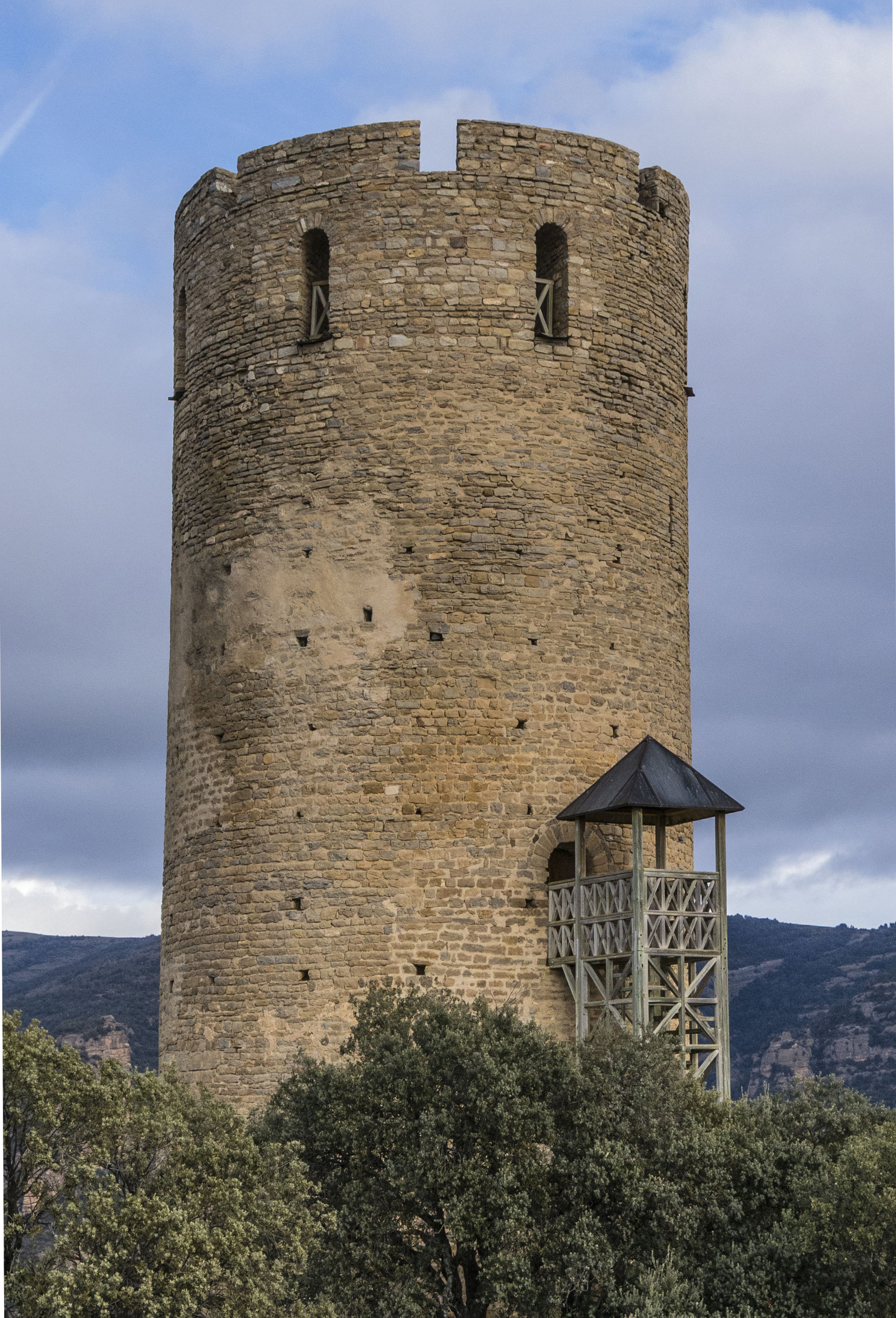 A Fontova (La Pobla de Fontova-Graus), a la comarca de la Ribagorça de l'Aragó.